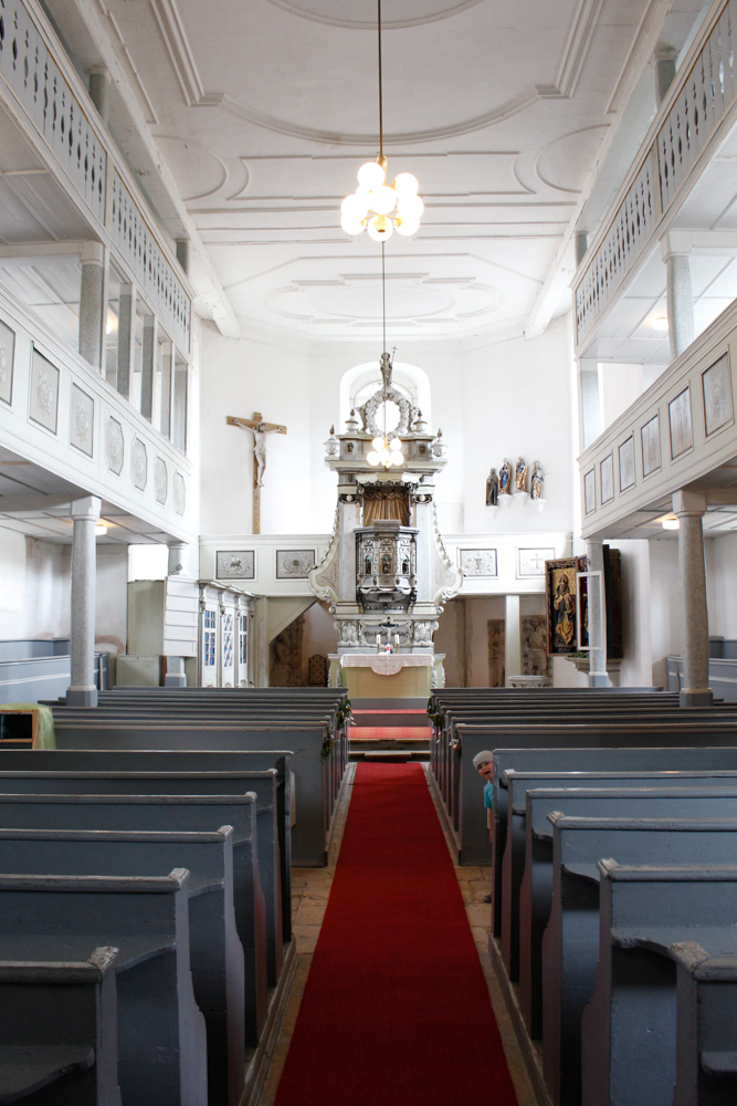 Kirche in Kayna, Zeitz, Burgenlandkreis, Sachsen-Anhalt, Deutschland